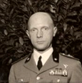 Фотография Адальберто Савойского-Генуэзского (1898-1982), герцога Бергамского.